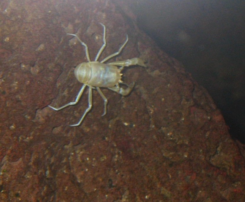 Munidopsis polymorpha. Jameito. Cangrejo albino y ciego endémico de la Isla de Lanzarote, Islas Canarias, España.